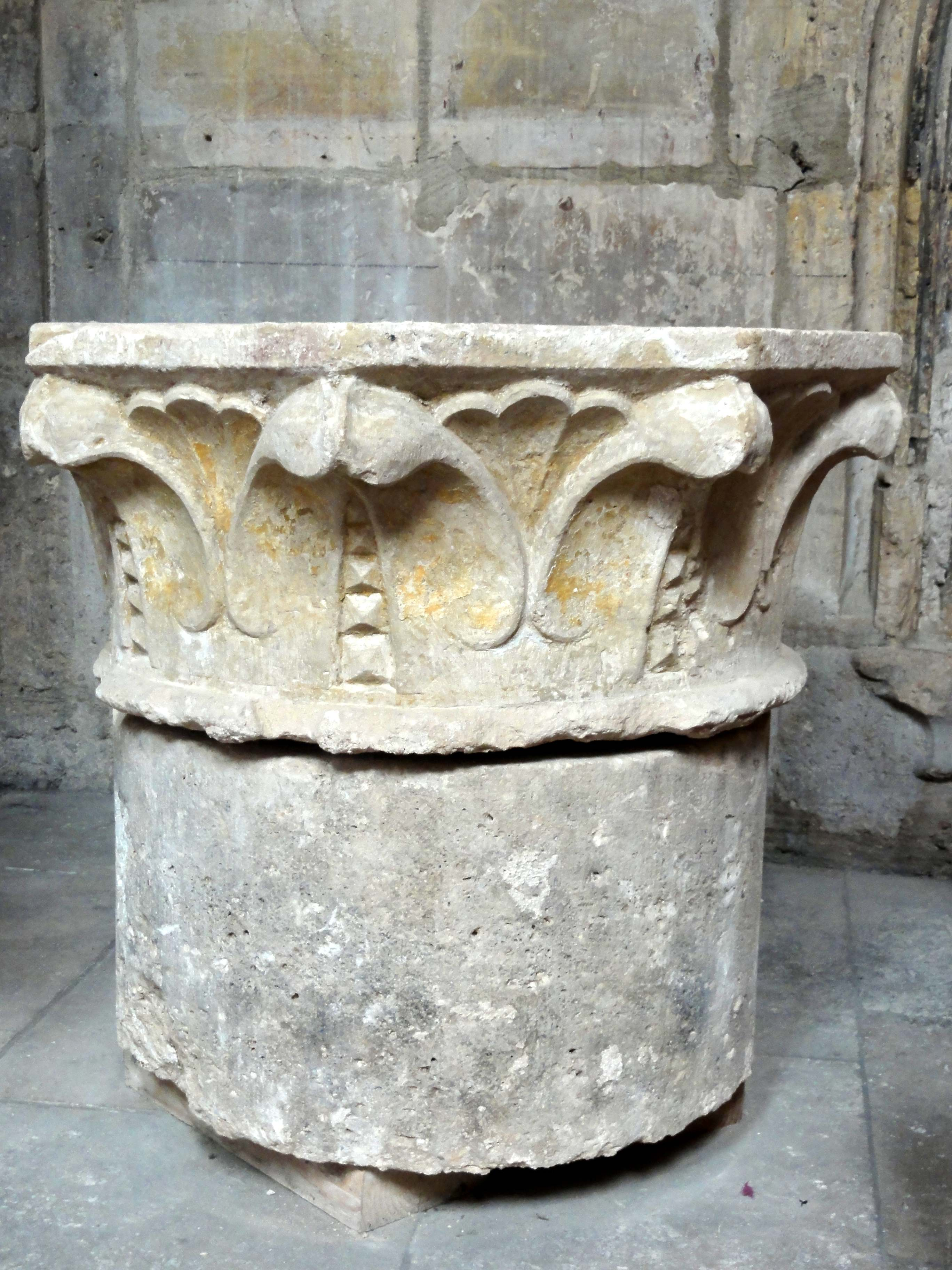 Voir titre.